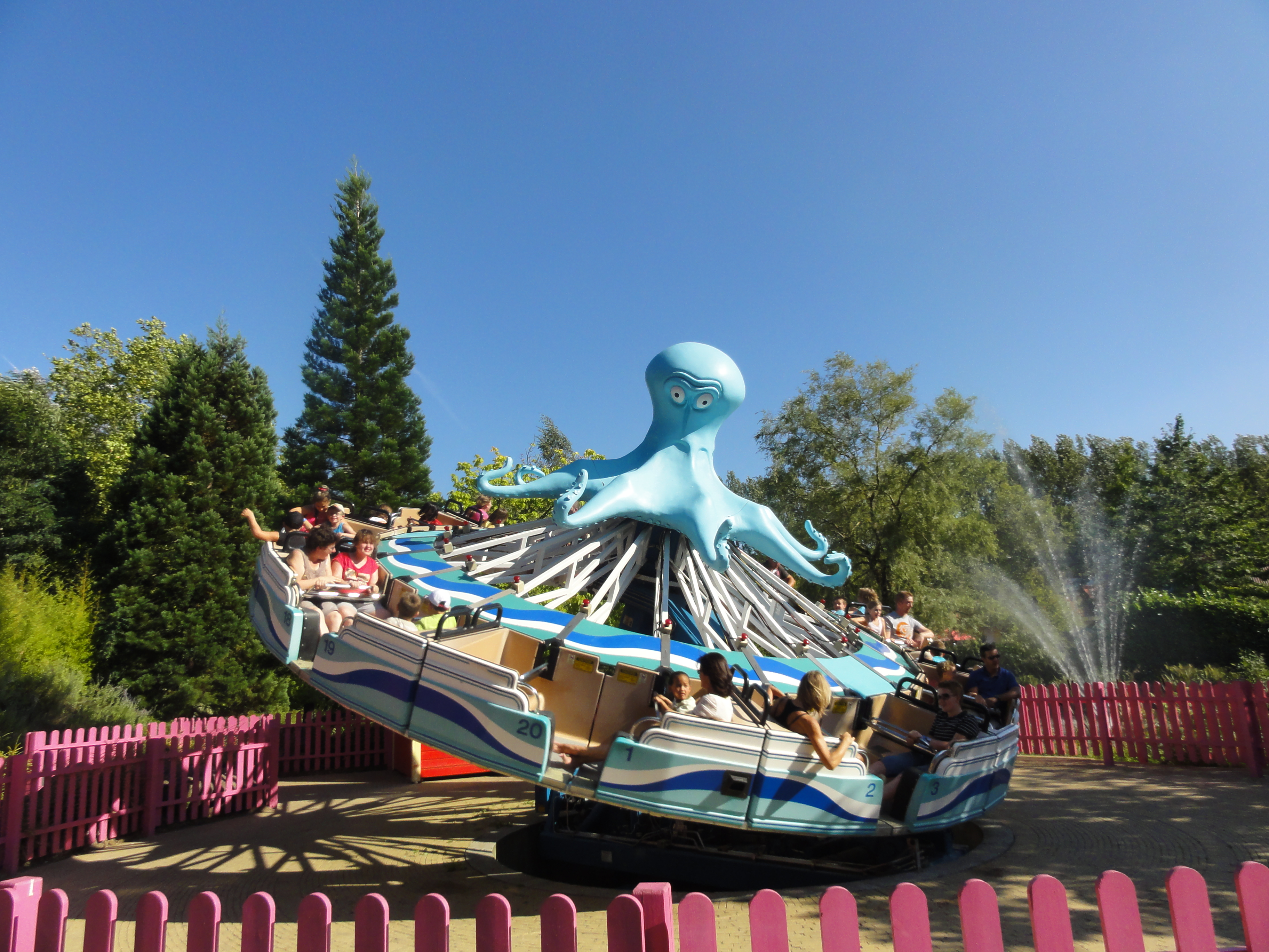 Octopus, pieuvre, à Walibi Belgium